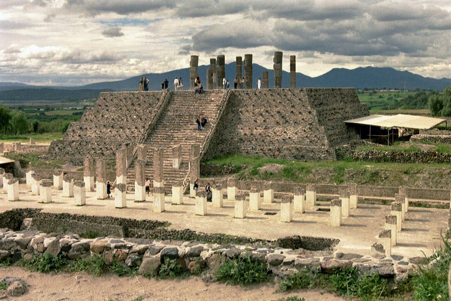 Pyramide mit Atlanten